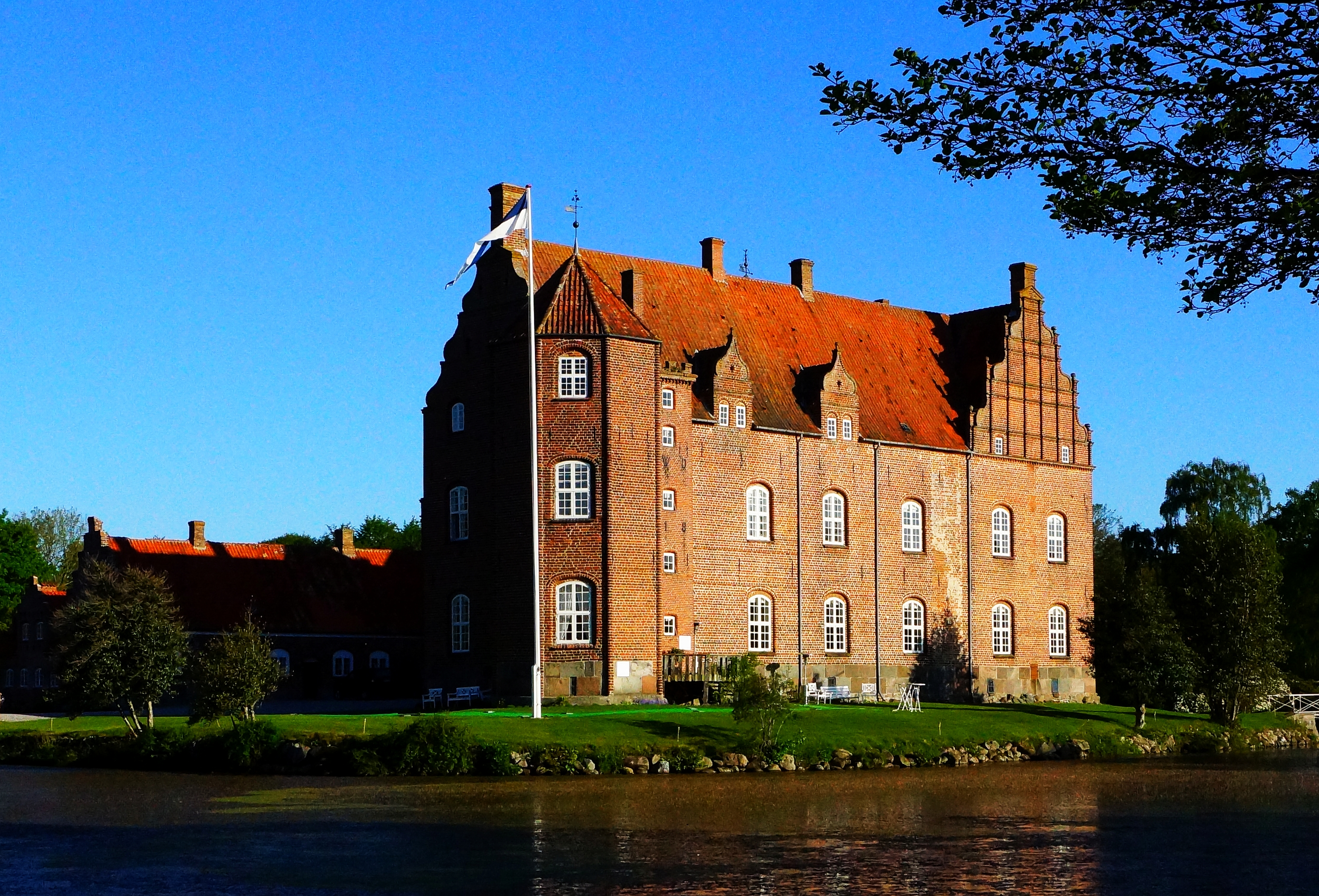 Katholm Slot fra øst som tegning